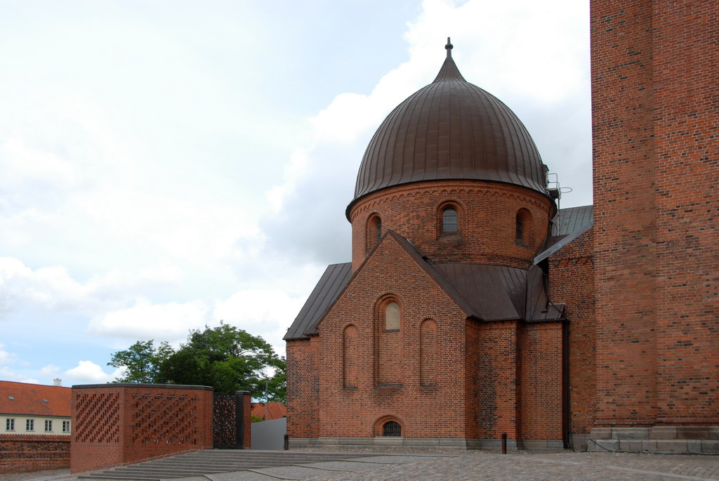 During the Middle Ages a number of chapels were built on to or inside the church. When you compare this picture with the maquette you’ll see that a chapel has been built at the left side of the main entrance. Gedurende de Middeleeuwen werd een aantal kapellen bijgebouwd, sommige aan de buitenkant, andere binnenin. Als je deze foto vergelijkt met de kerk op de maquette, zie je duidelijk, dat er links van de hoofdingang een kapel is aangebouwd.